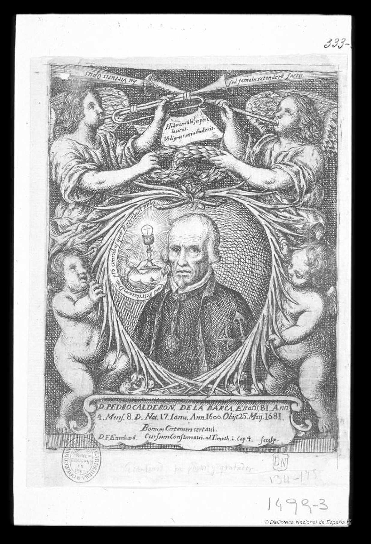 Retrato de Pedro Calderón de la Barca para la obra de Gaspar Agustín de Lara, Obelisco fúnebre, pyrámide funesto que construía a la inmortal memoria de D. Pedro Calderón de la Barca. En Madrid, por Eugenio Rodríguez, 1684. Biblioteca Nacional de España